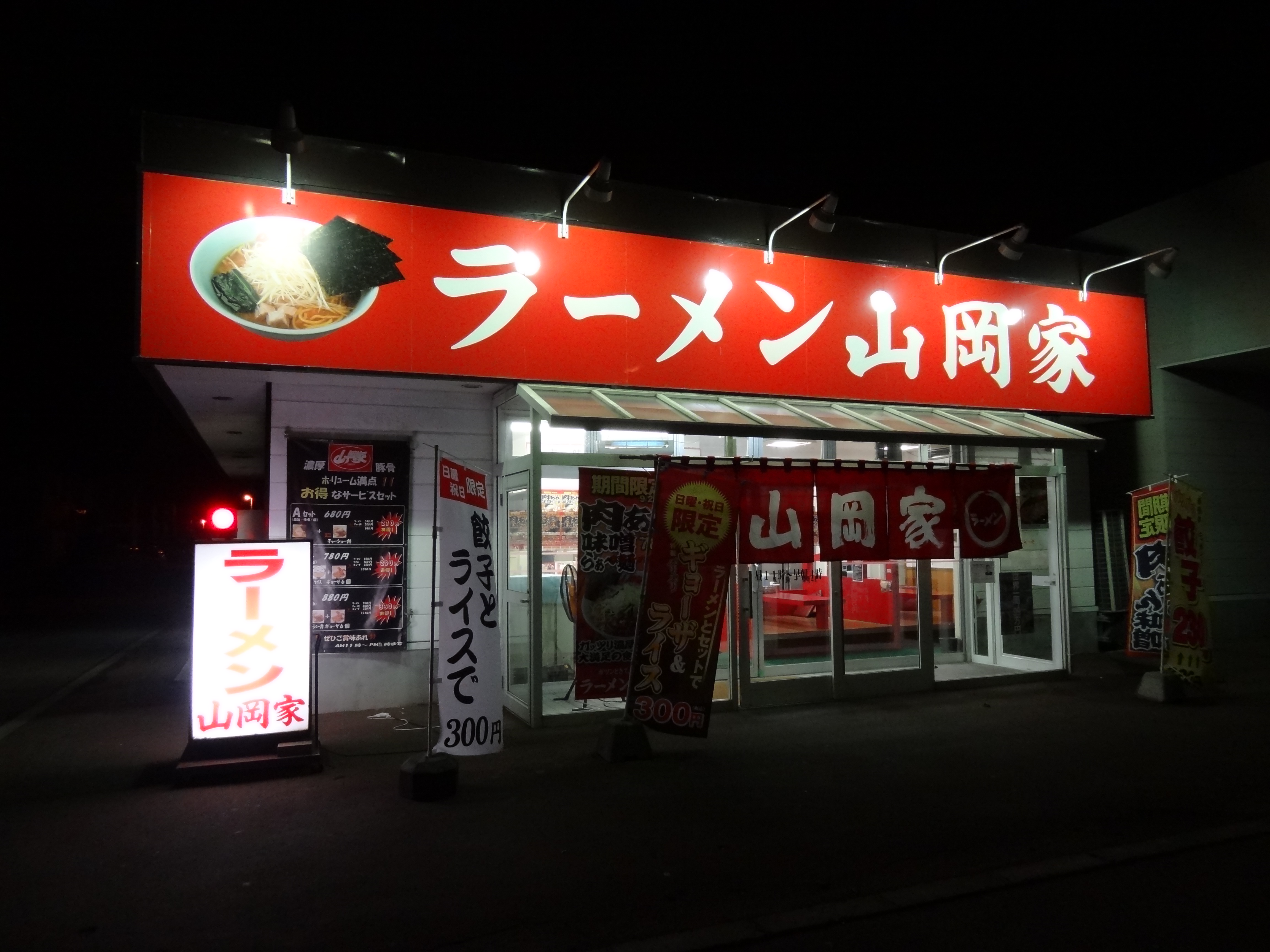 山岡家 樽川店 石狩市樽川9条1丁目